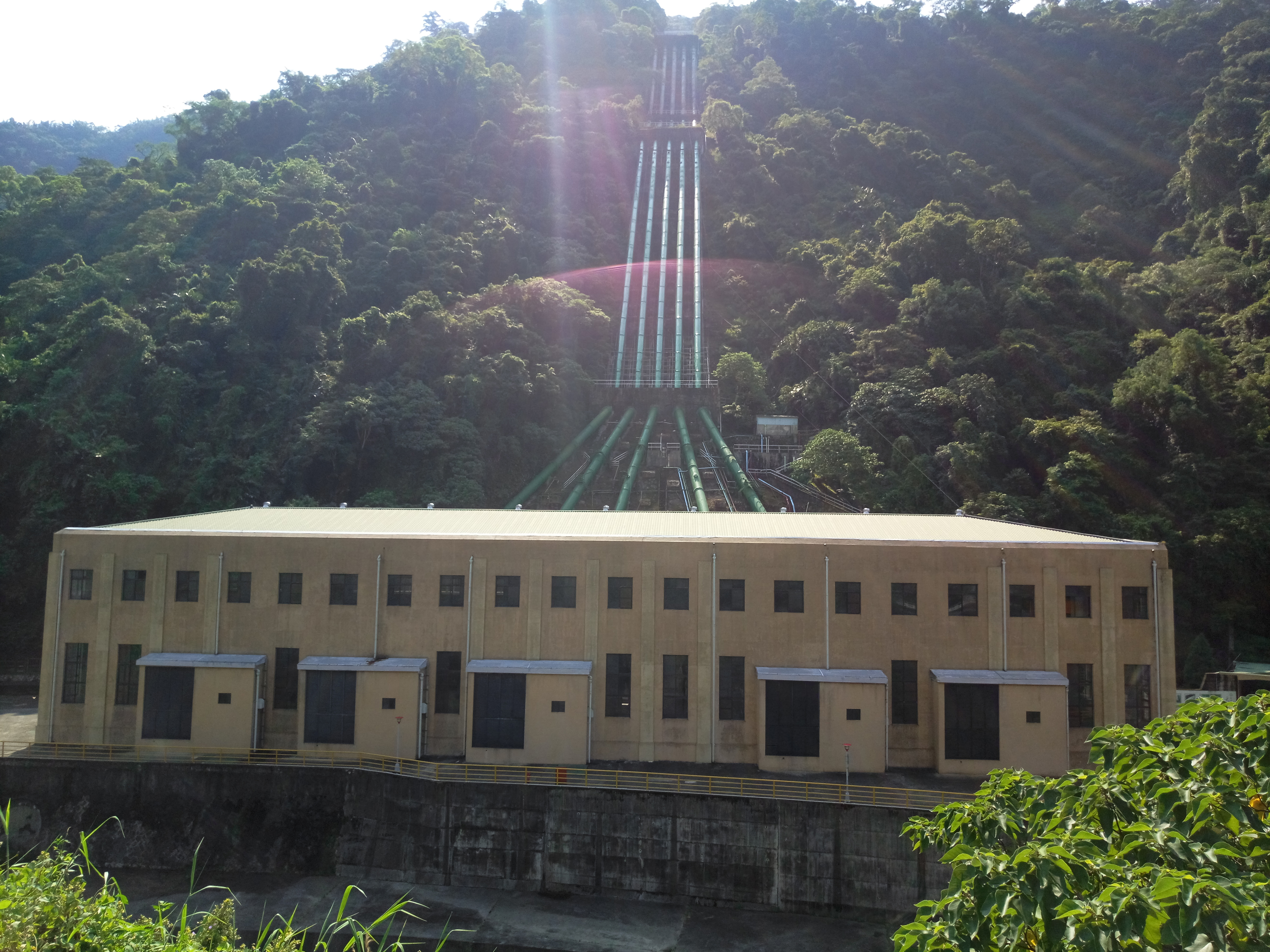 大觀發電廠大觀一廠廠房正面